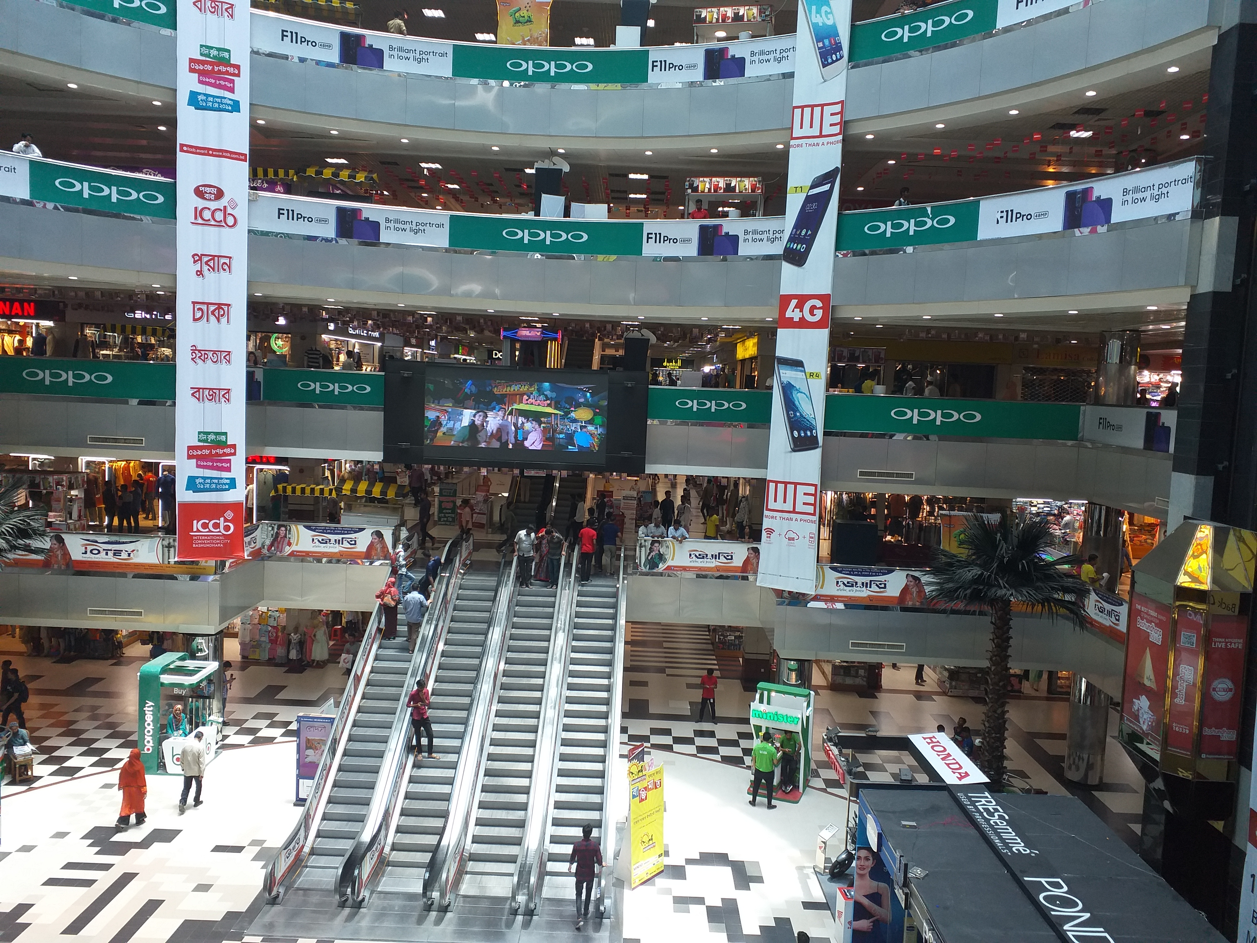 চিত্র তুলেছেন তৌফিক হোসাইন ওয়েলশন এর সিইও অন্য নাম তৌফিক সুলতান .